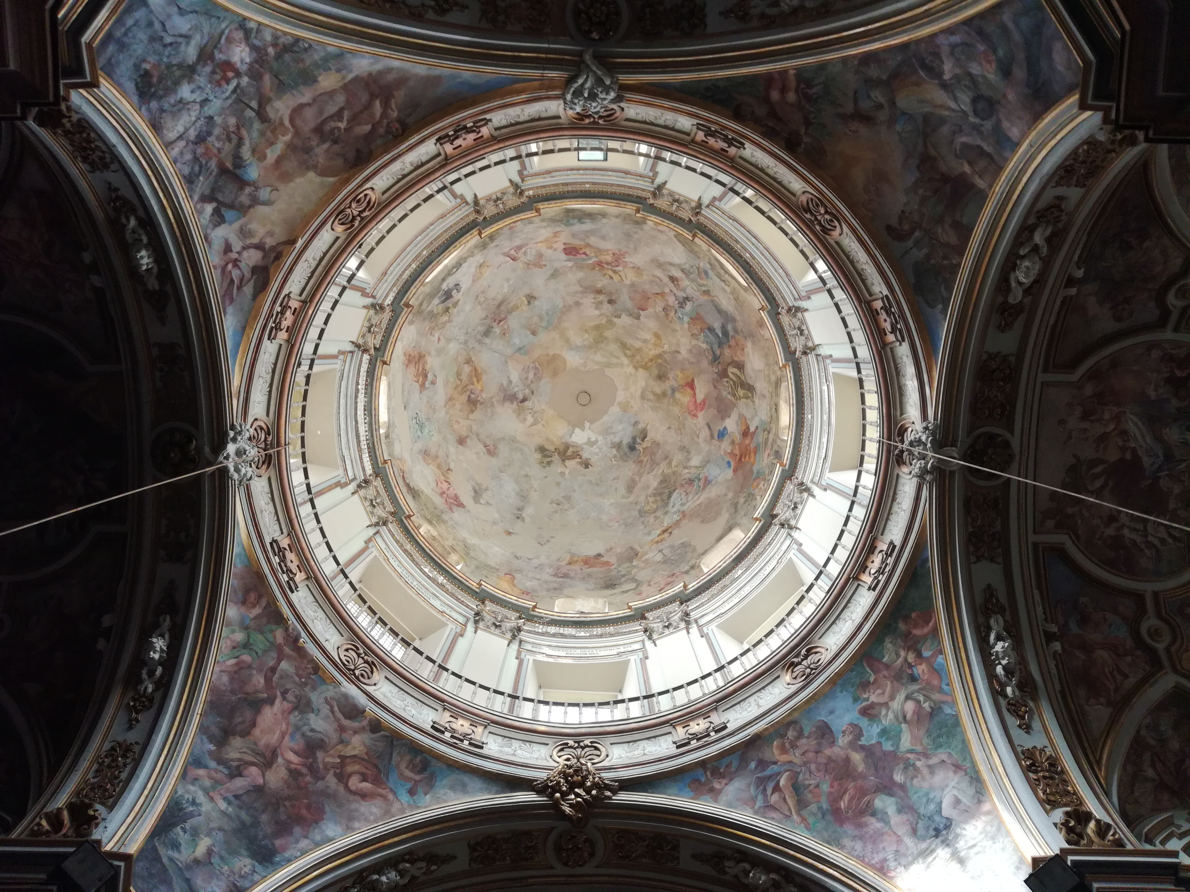 Interno cupola San Nicola alla Carità